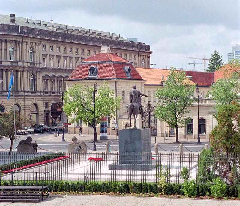 Potocki Palac in Warsaw